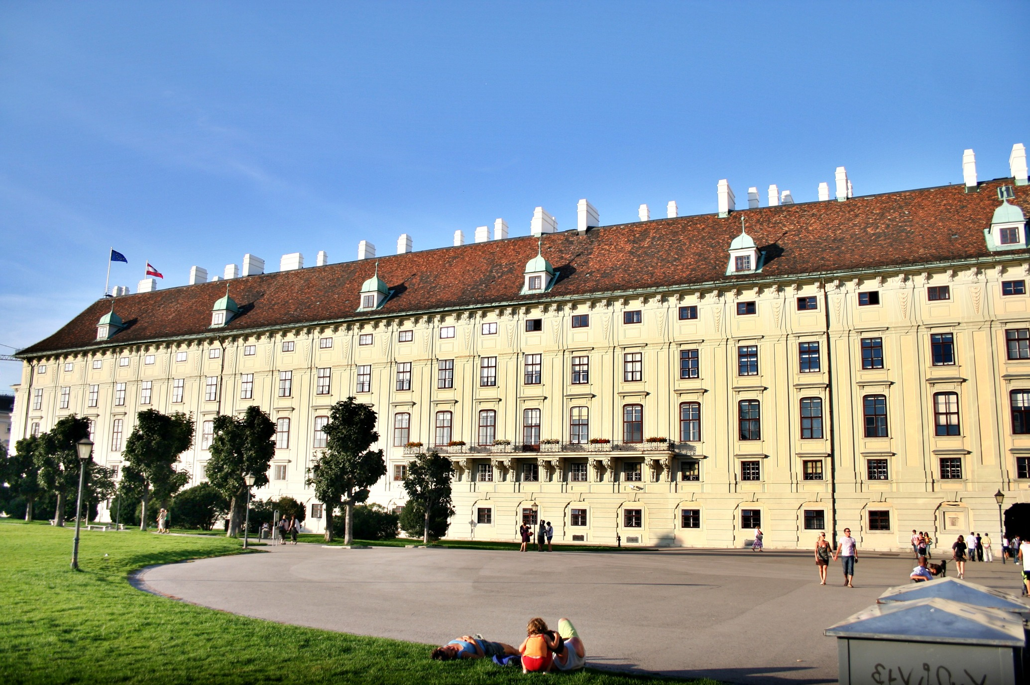 Leopoldinischer Trakt